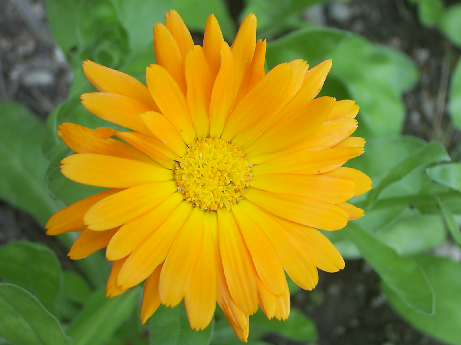 Vrtni ognjič: cvet vrtnega ognjiča